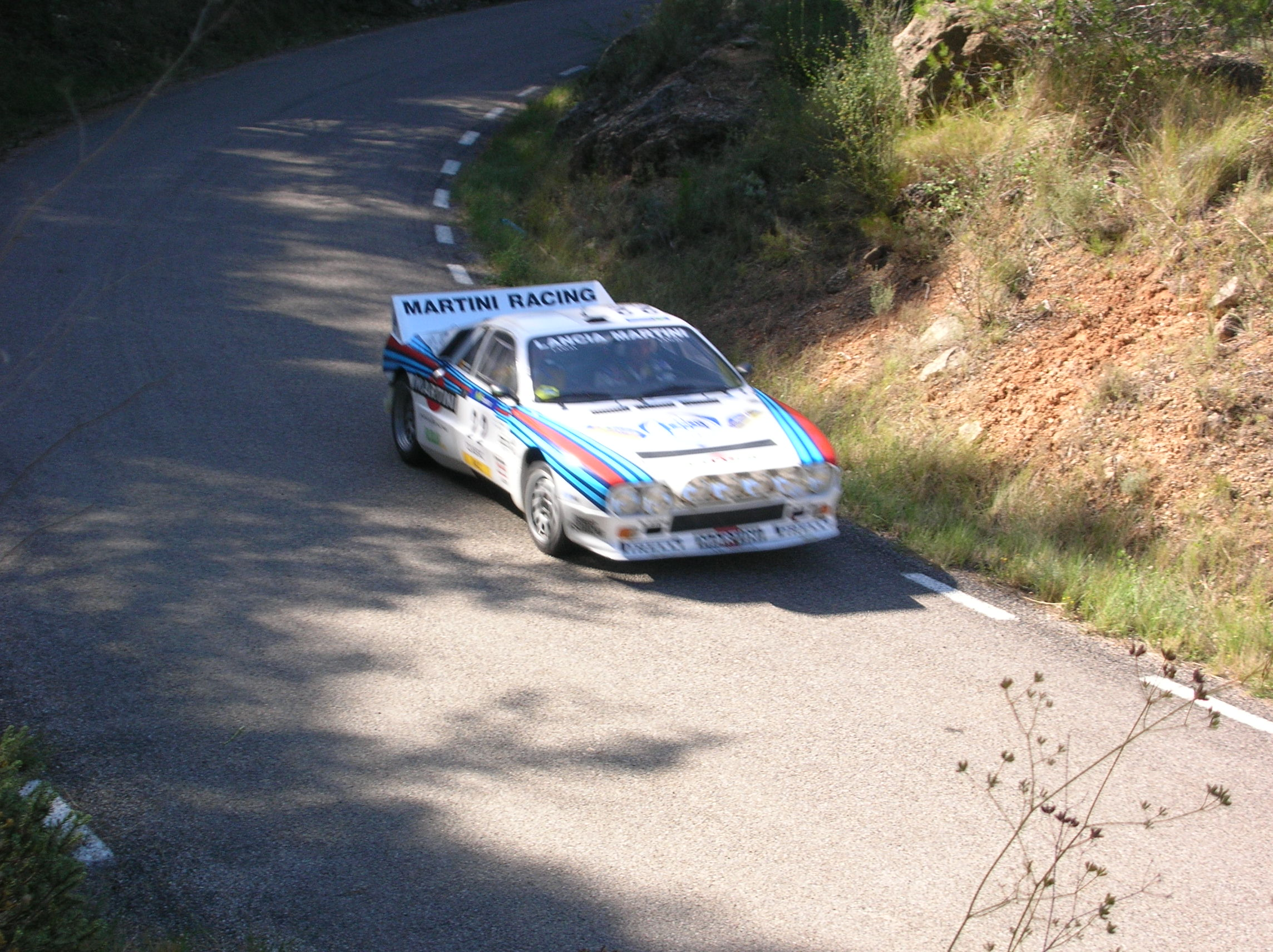 Aquest és un Lancia 037 Grup B, fotografiat al Rally Catalunya 2008, al tram de La Llena. Pertany al grup de cotxes de l'especial Rally Històric que va passar 30 minuts després dels WRC i JWRC.